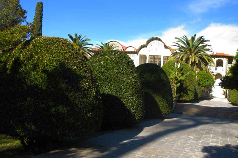 عمارت باغ ارم- شیراز